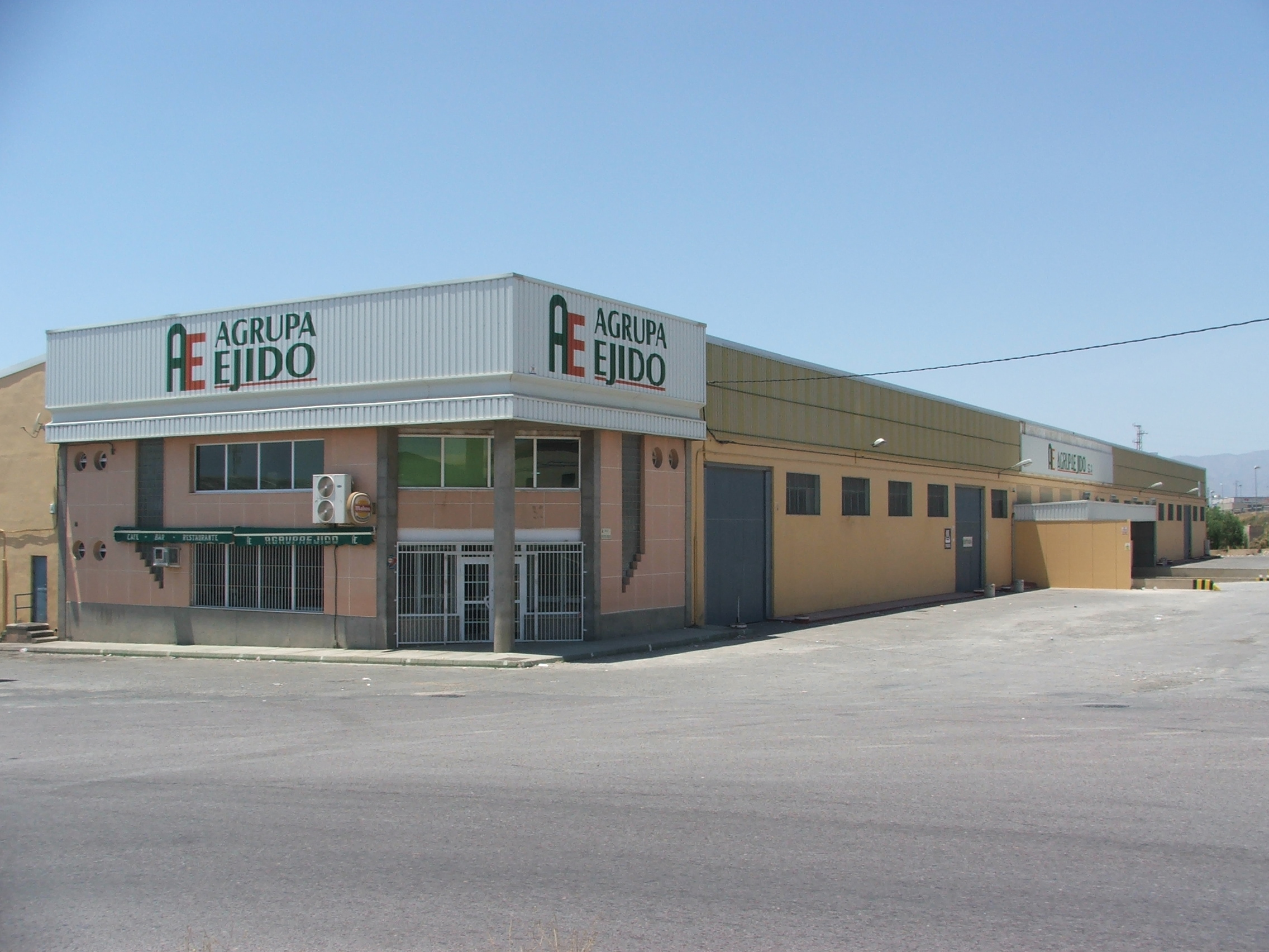 Fotografía de instalaciones de la empresa agroalimentaria de Almería, Andalucía, España.